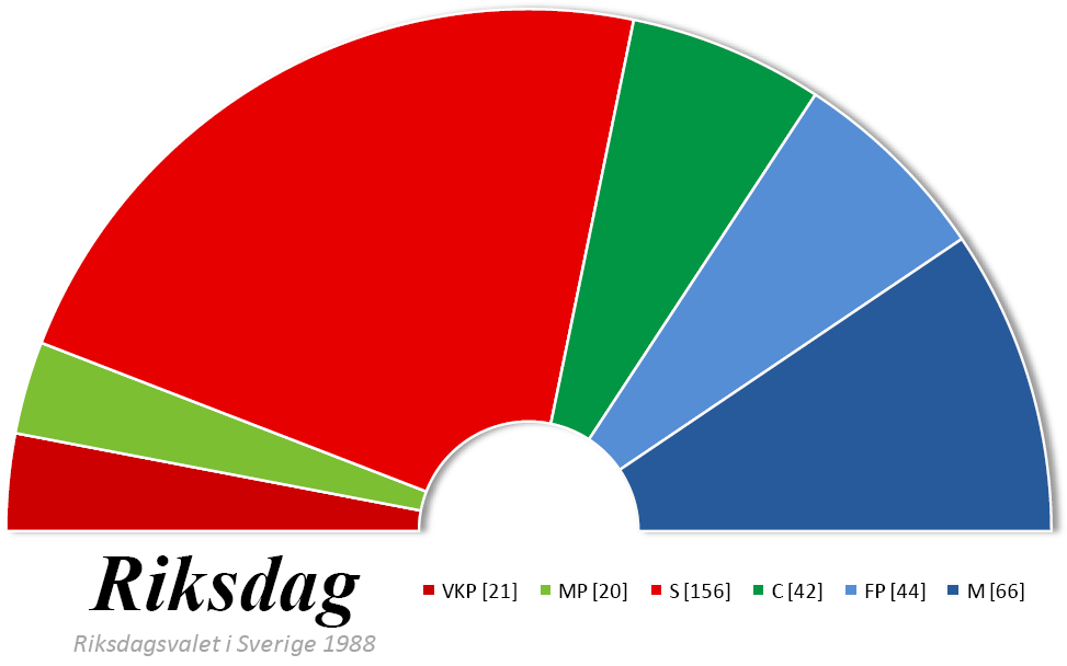 Composition du Riksdag suédois après les élections générales de 1988